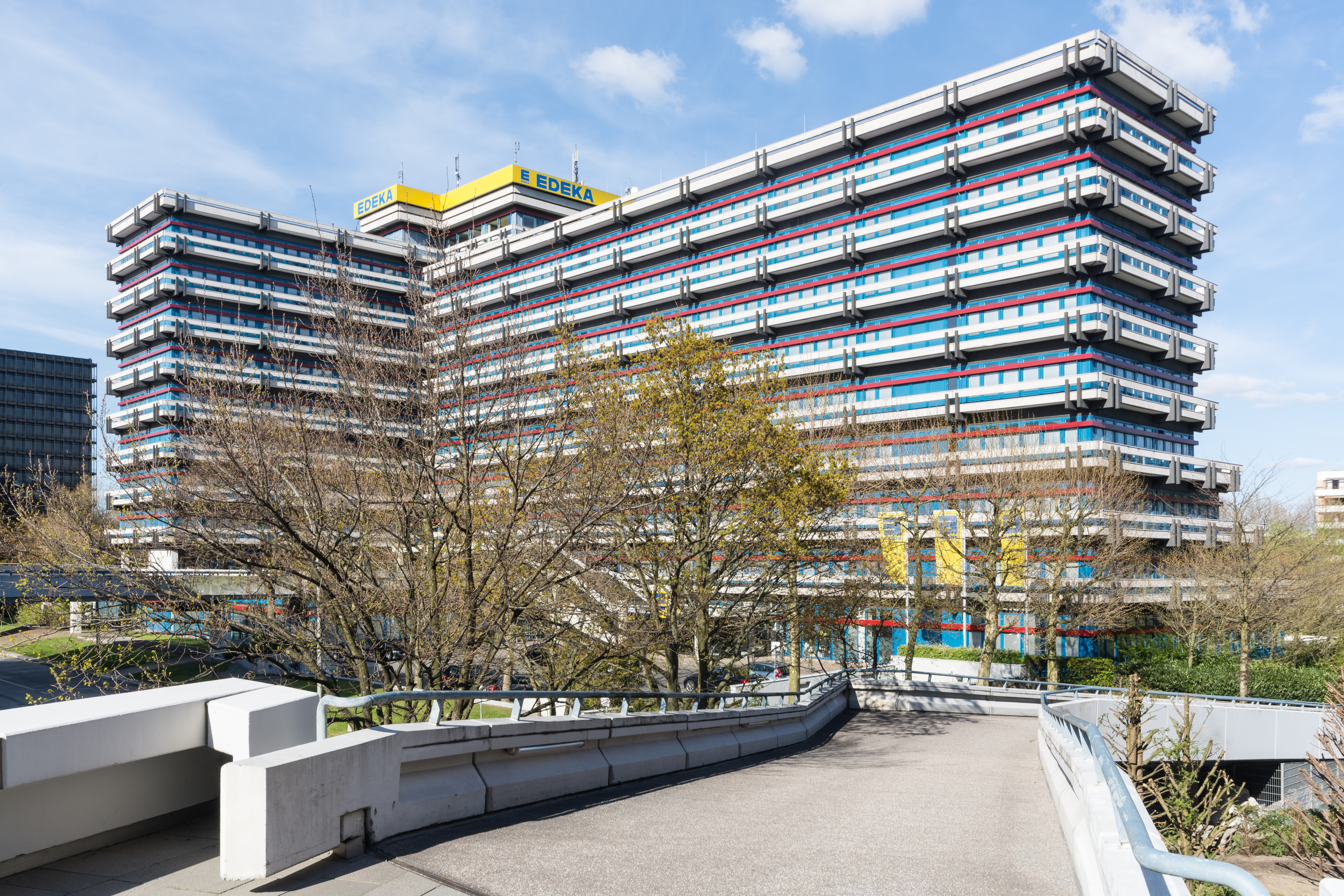 Bürohaus New-York-Ring 6, 6a in Hamburg-Winterhude. This is a photograph of an architectural monument.